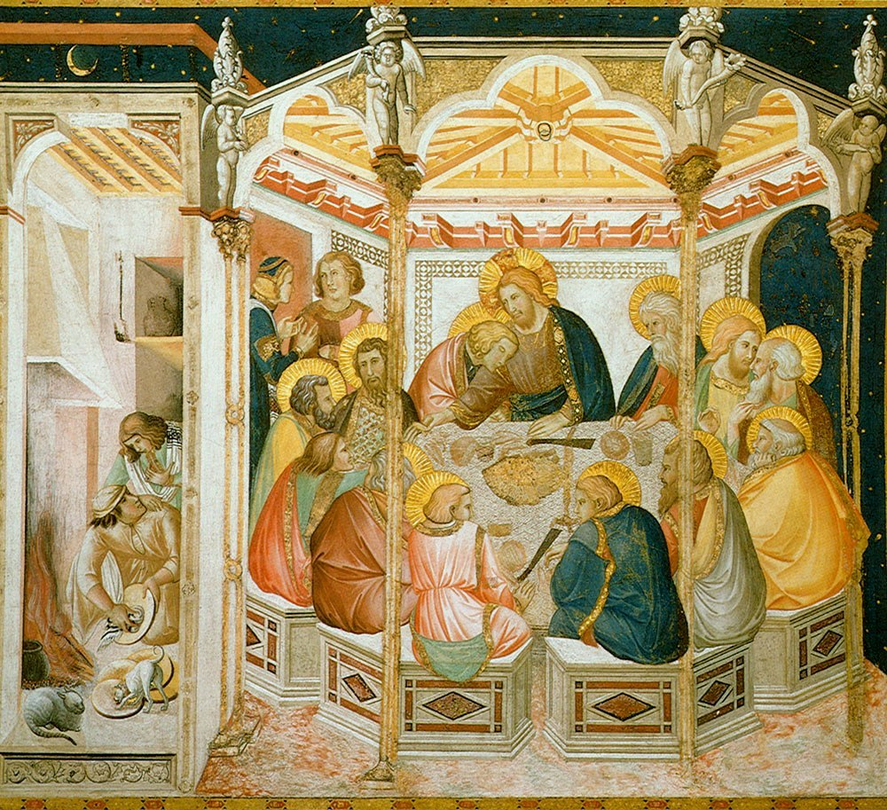 Lorenzetti Pietro. Last Supper.fresco. Assisi